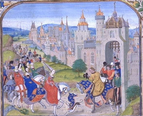 Isabela Francouzská přijíždí do Paříže za bratrem Karlem IV.